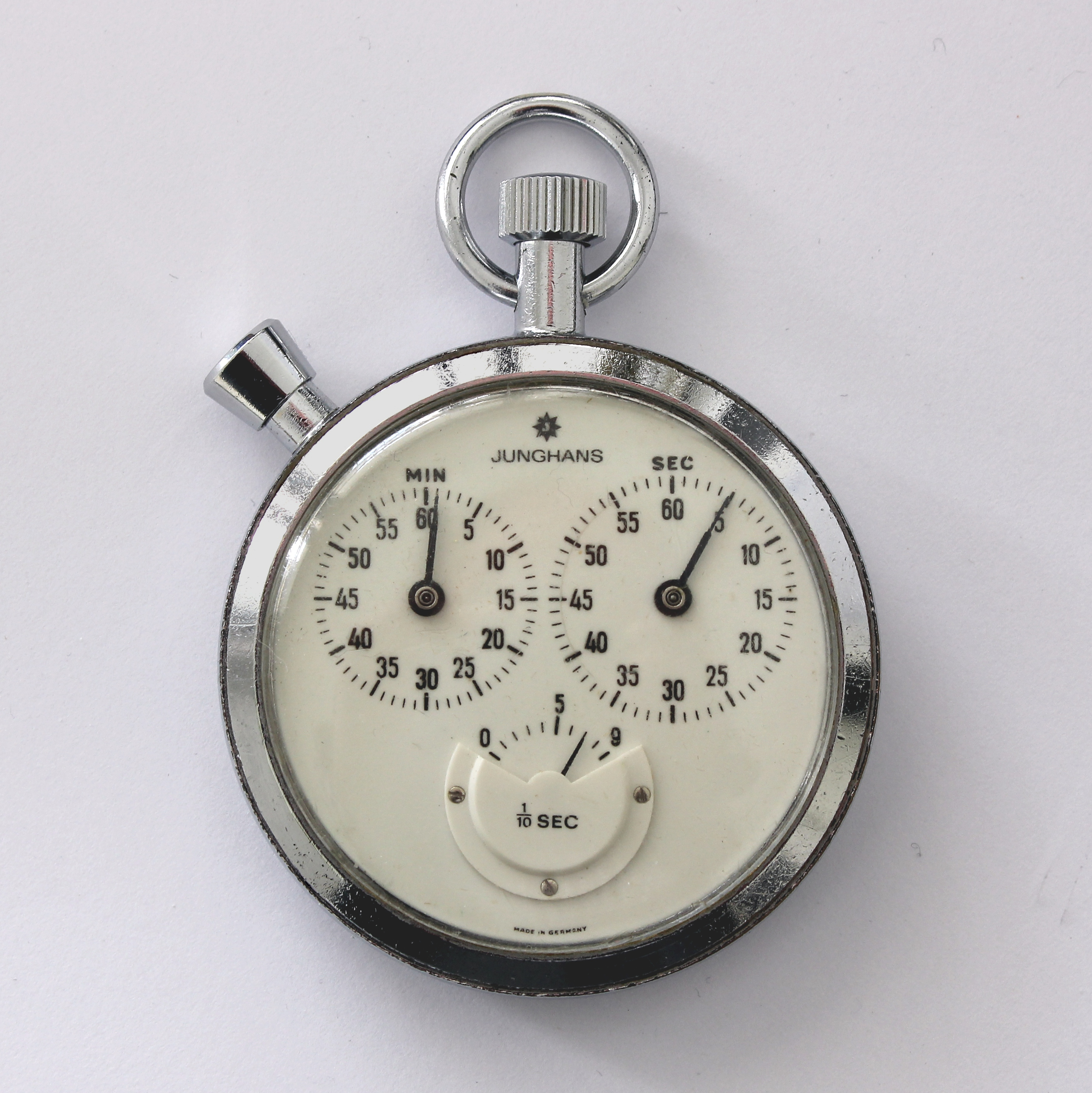 Junghans-Additionsstoppuhr, 1960er-Jahre; getrennte Anzeige von Minuten, Sekunden und Zehntelsekunden (Durchmesser des Gehäuses: 55 mm)